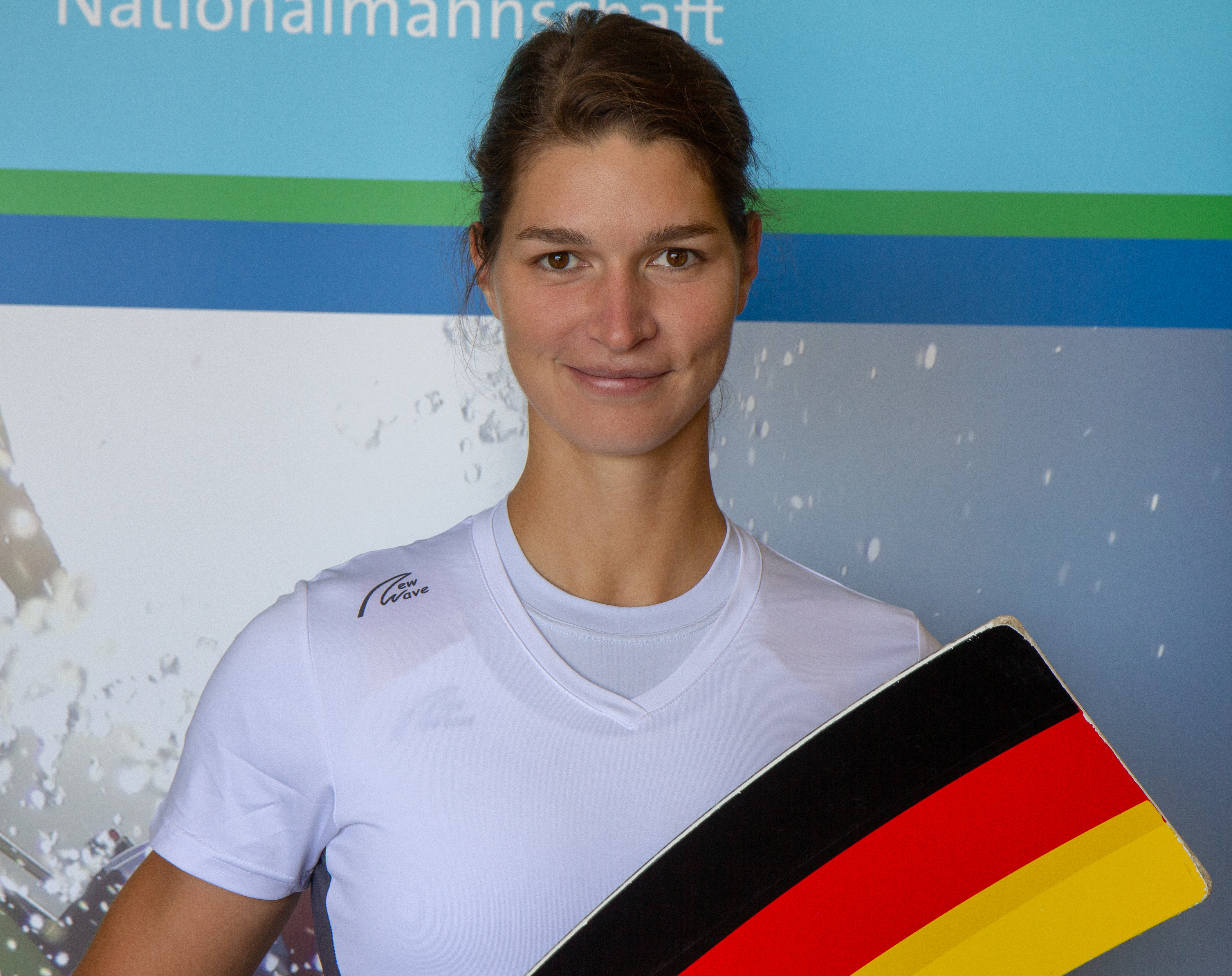 Carina Bär beim Medientag des Deutschen Ruderverbandes in der Ruderakademie Ratzeburg am 22. August 2018.